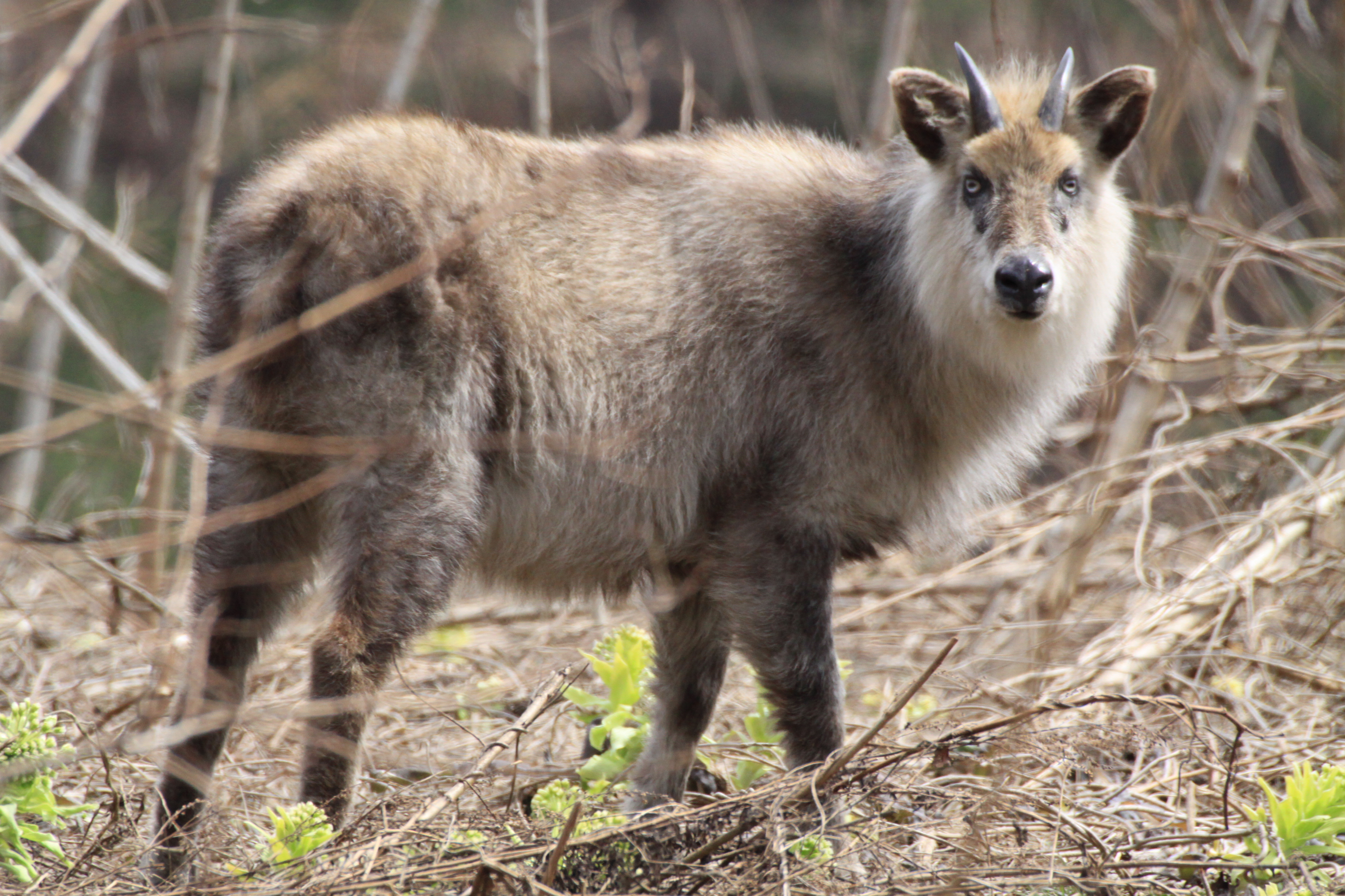 秋田県鹿角市尾去沢におけるニホンカモシカ